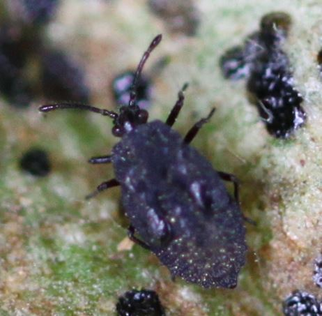 Nymphe wahrscheinlich von Dictyla echii aus der Familie der Netzwanzen (Tingidae) am 16.7.2016 in der Schwetzinger Hardt